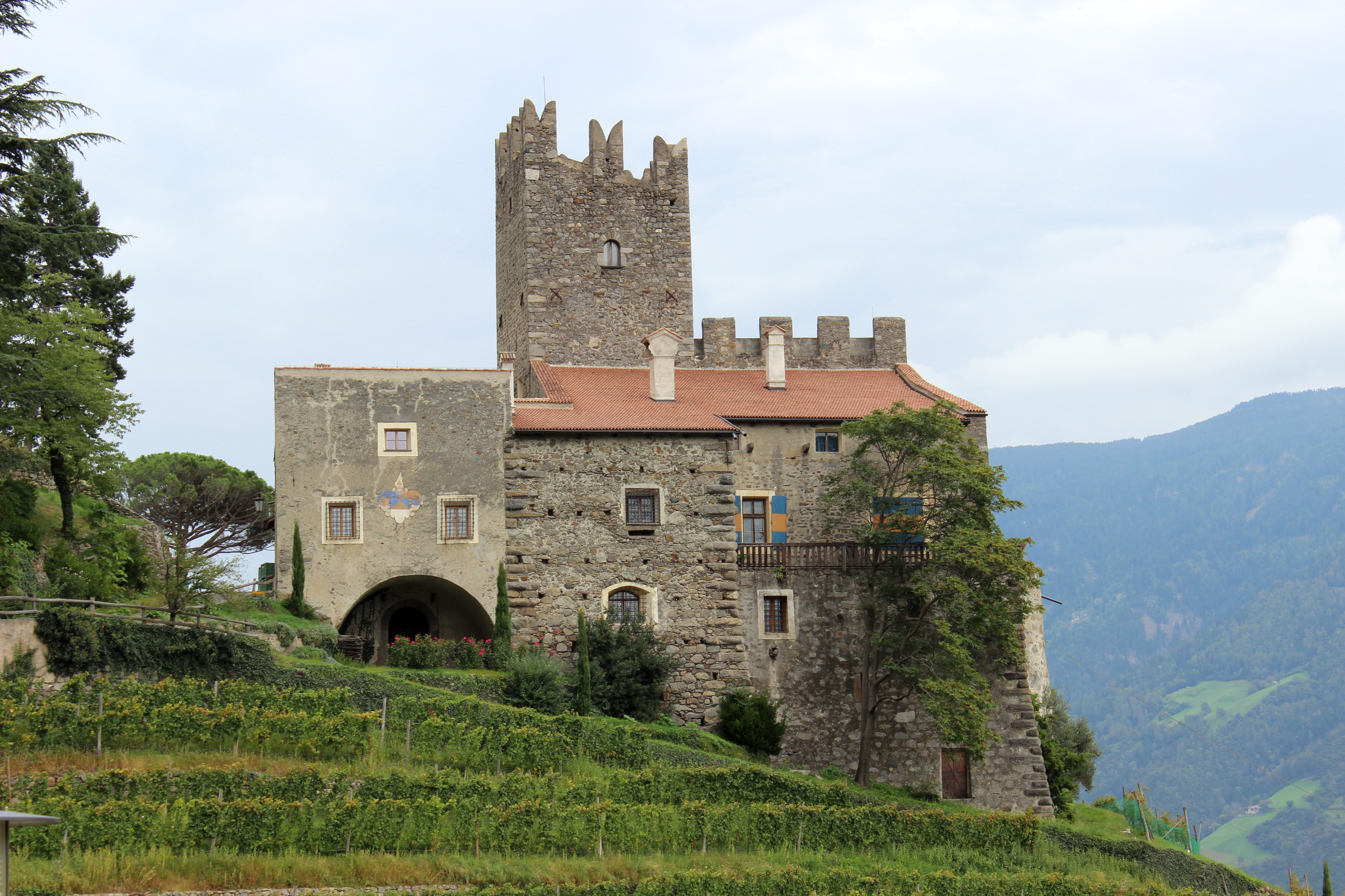 Burg Hochnaturns im Vinschgau in Südtirol